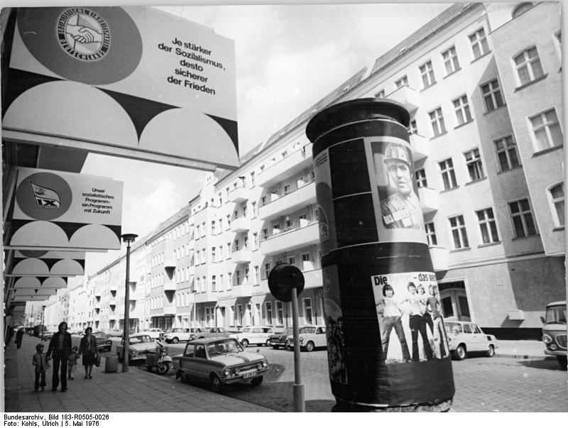 Berlin, Prenzlauer Berg, Arnimplatz ADN-ZB Kohls 5.5.76 Berlin-Auch das ist Prenzlauer Berg. Mit hellen, freundlichen Fassaden - jetzt schon im Zeichen des IX. Parteitages der SED - so präsentiert sich das Altbaugebiet um den Arnimplatz. Hier diesem Berliner Stadtbezirk ist Schwerpunkt die Erhaltung und Modernisierung der vorhandenen Wohnsubstanz. Bis 1980 sollen weitere 2500 modernisierte Wohnungen am Arnimplatz übergeben werden. (Foto von der + Stolpischen Straße) + seit 9.4.78 Paul-Robeson-Str.